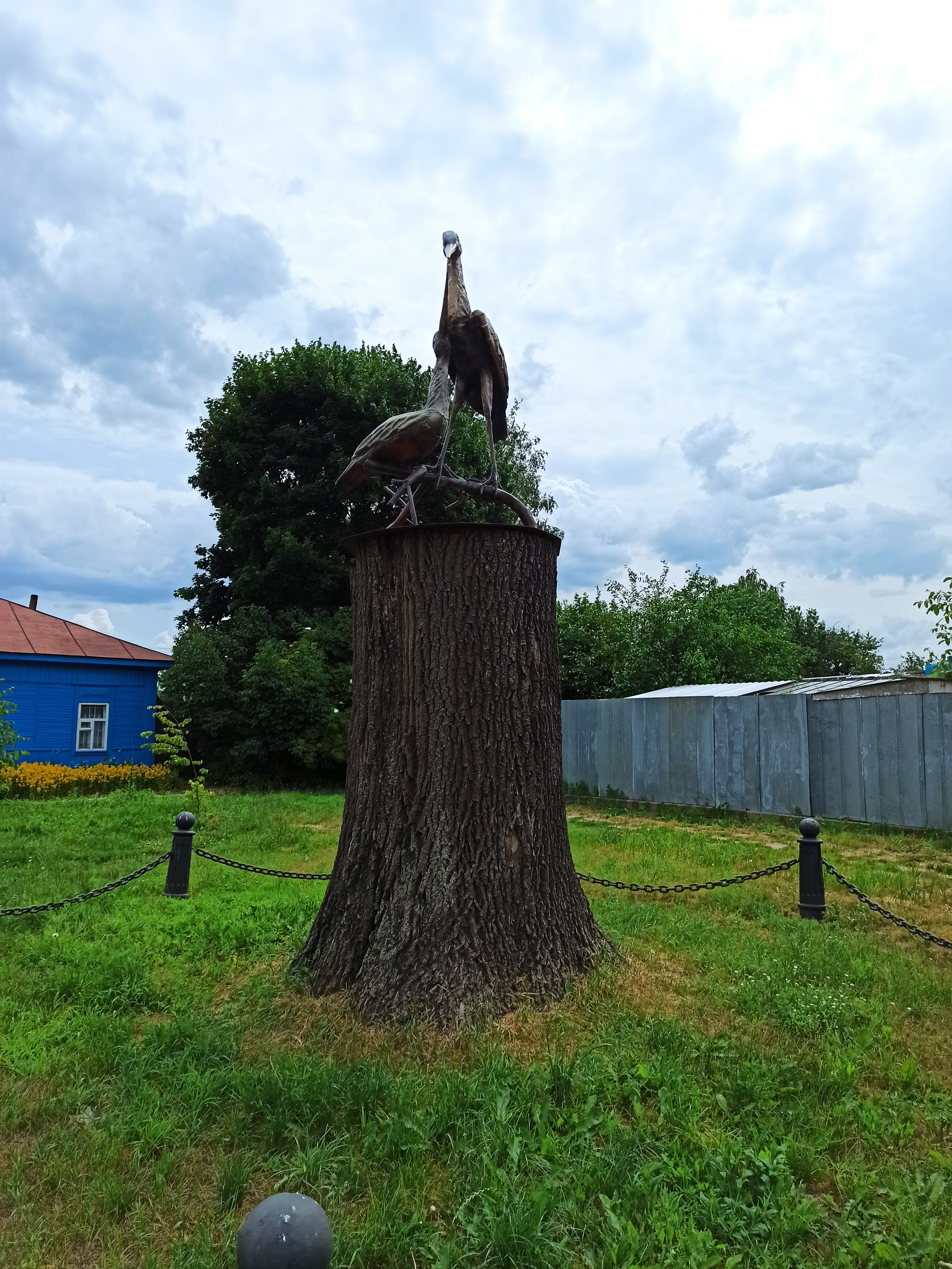 «Віковий дуб», Ямпільський р-н: центральна частина смт. Ямпіль, вул. Боженка